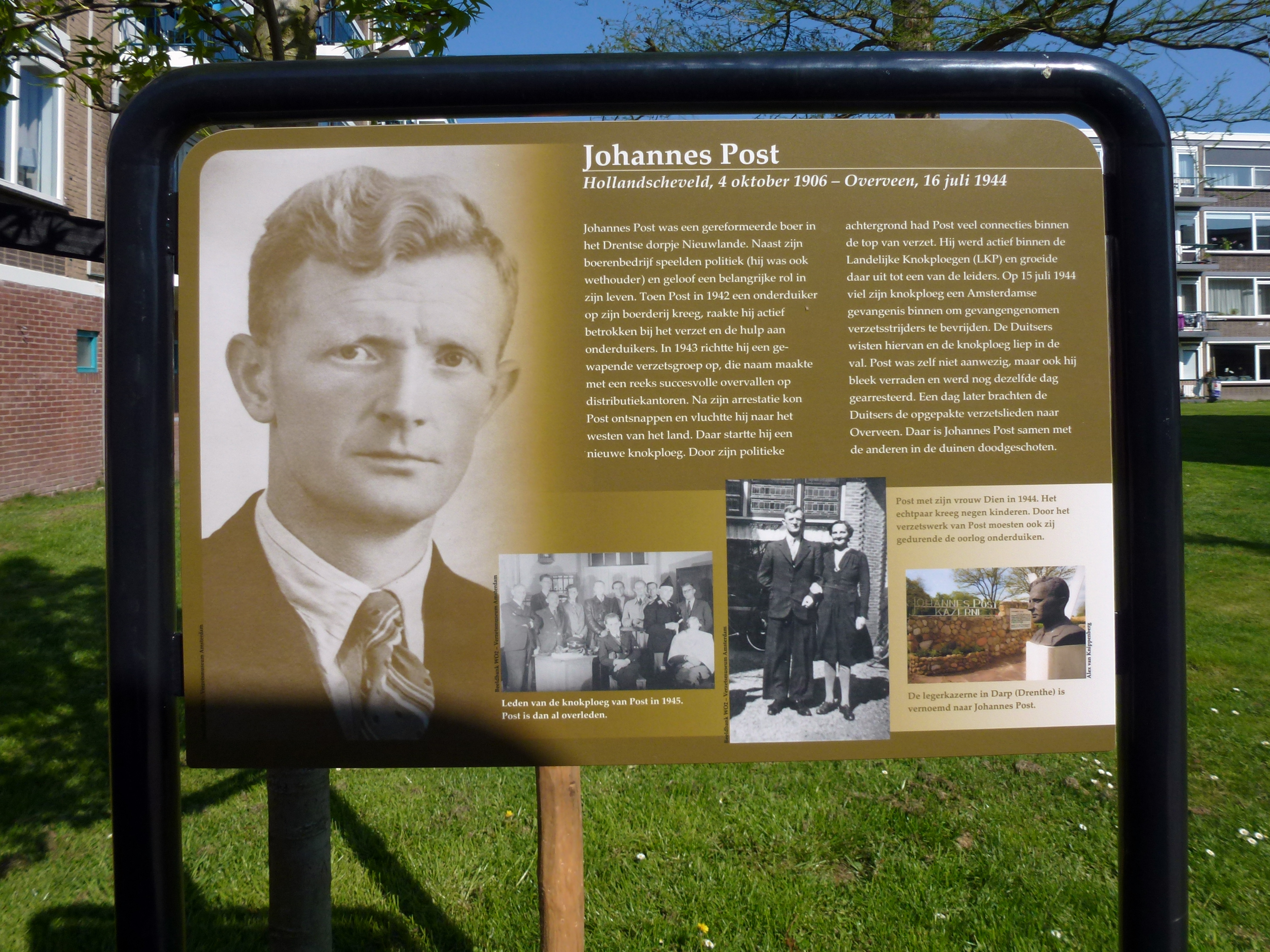 Verzetsheld Johannes Post. Op 10 april 2014 zijn in Oosterwei 10 van in totaal 16 borden met informatie over verzetsstrijders onthuld. In Oosterwei, een wijk in Gouda, zijn na de 2e wereldoorlog, de wederopbouw, 16 straten vernoemd naar verzetsstrijders. Veel bewoners van deze straten wisten maar weinig over de verzetshelden waarnaar de straten vernoemd zijn. Zij en anderen hebben er voor gezorgd dat nu in iedere straat een informatiebord staat, zodat de gedachtenis aan deze strijders levend blijft. (De overige 6 borden zijn in april 2018 geplaatst)